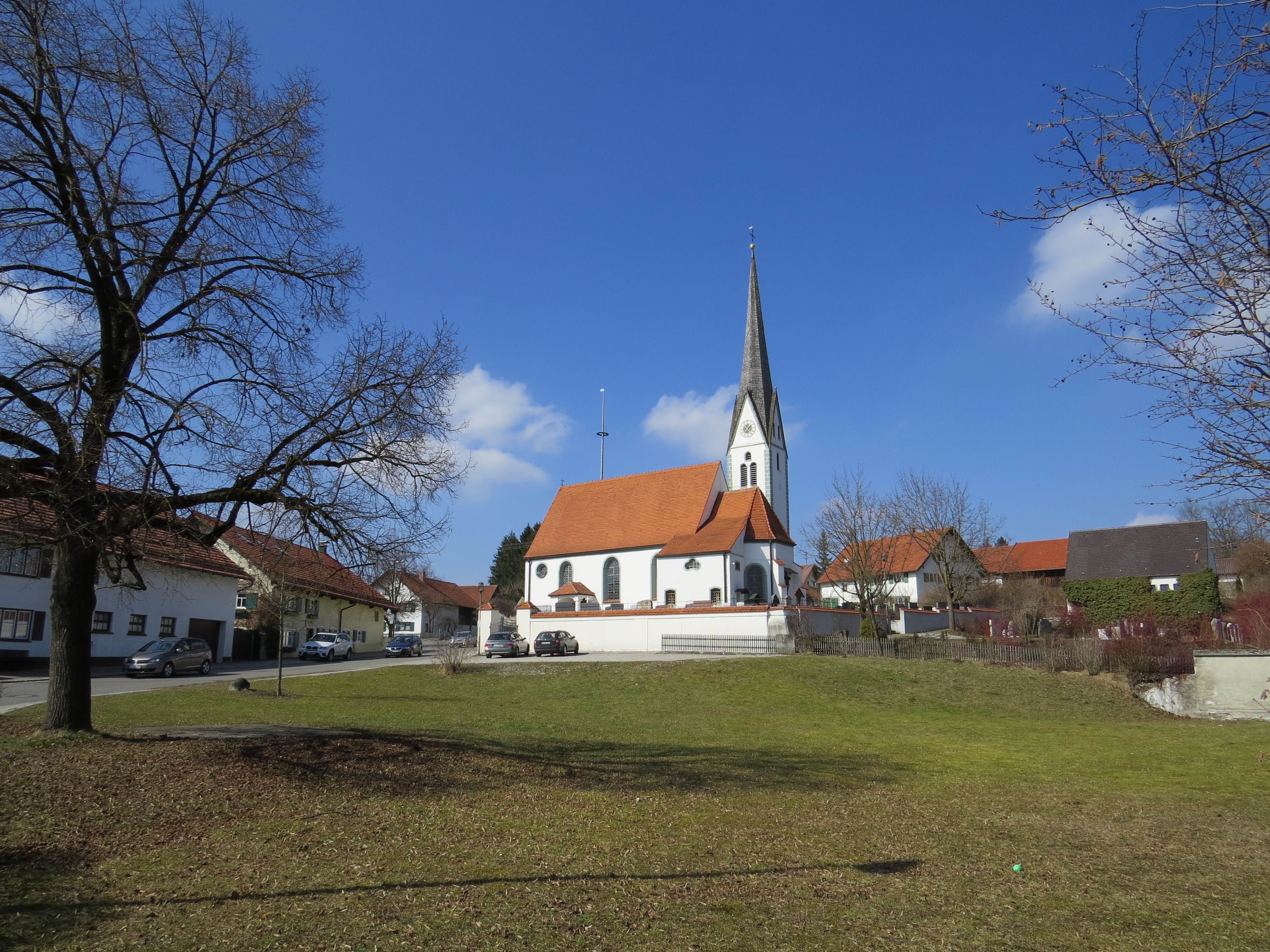 Kirche in Unterfinning, Finning